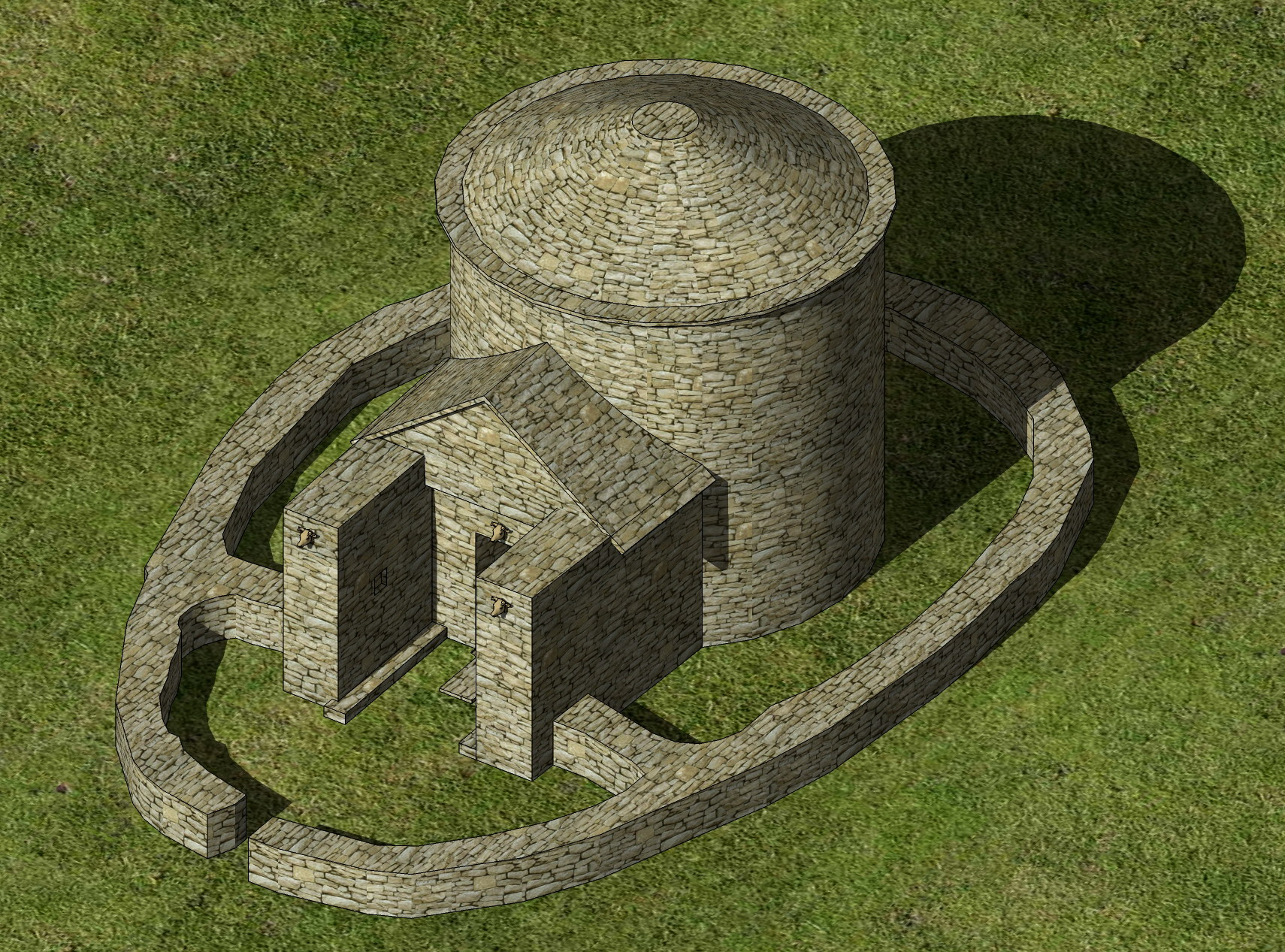 Ricostruzione grafica del pozzo nuragico di Funtana Coberta (Ballao, CA)